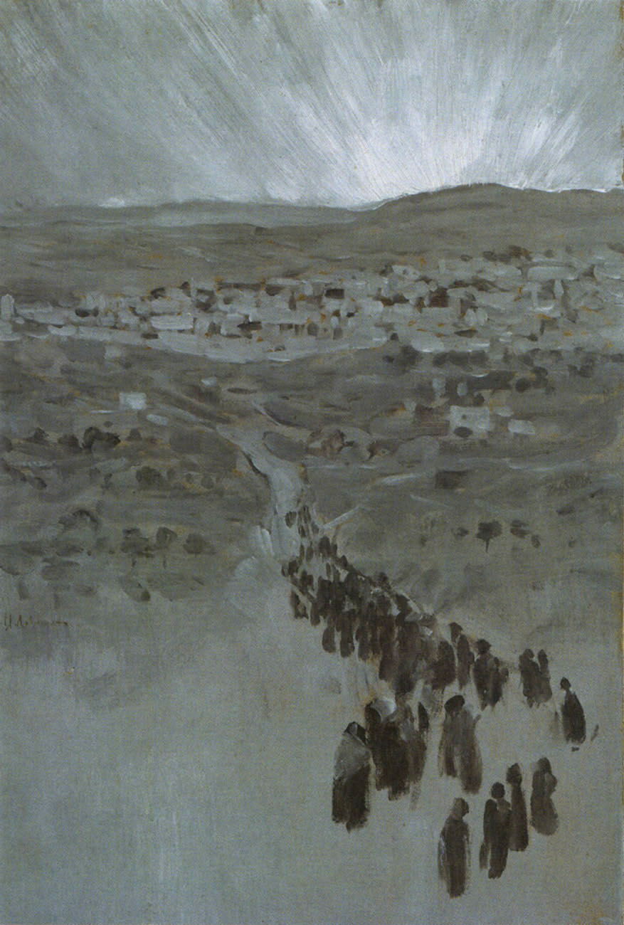 Исаак Левитан, "На пути к Сиону". 1890. Израильский музей. Холст, масло